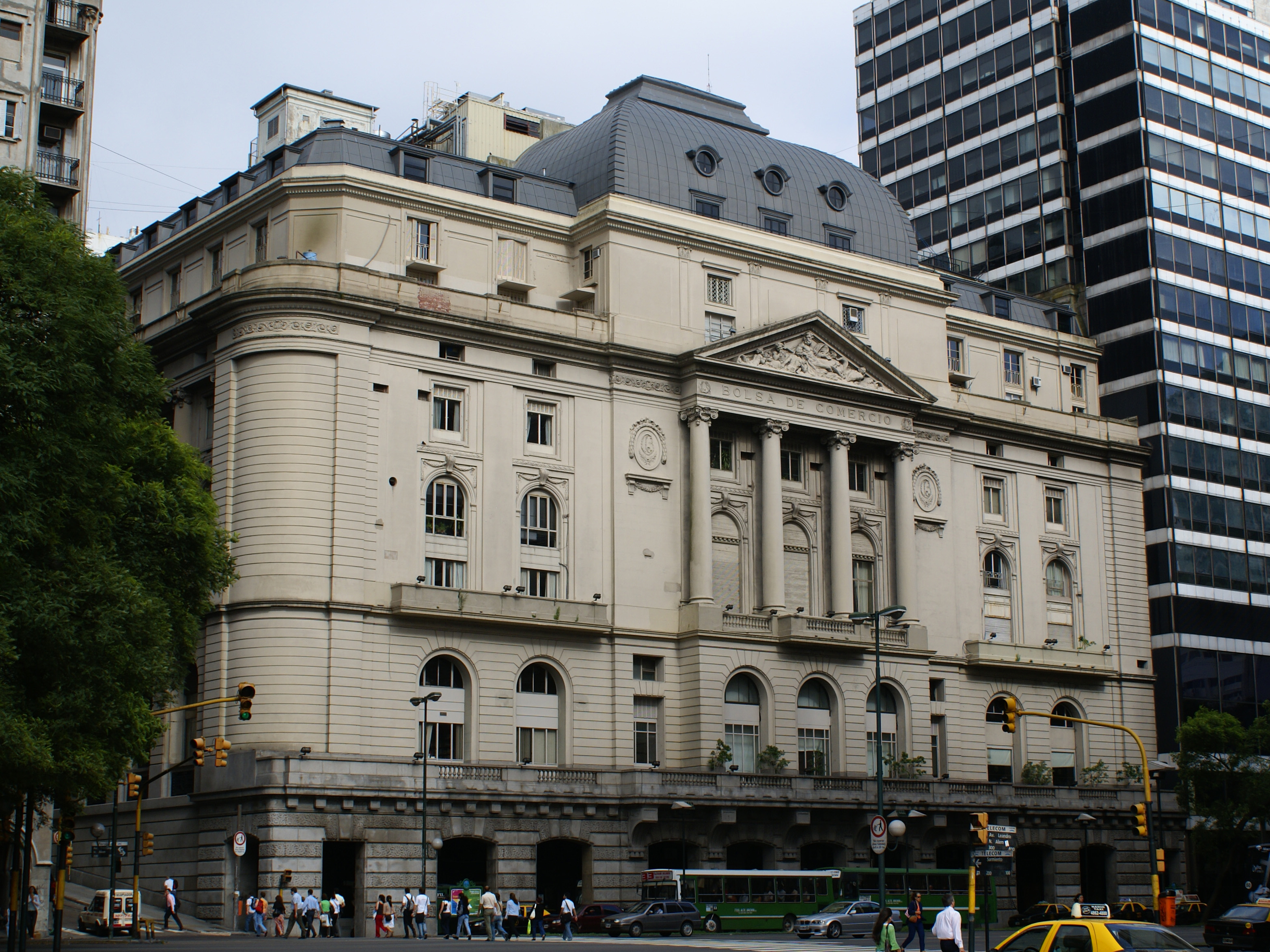 Edificio de la Bolsa de Comercio de Buenos Aires. Fachada que da a la calle Leandro N. Alem.